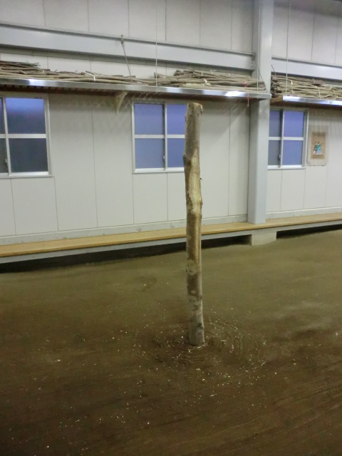 示現流の立ち木です。